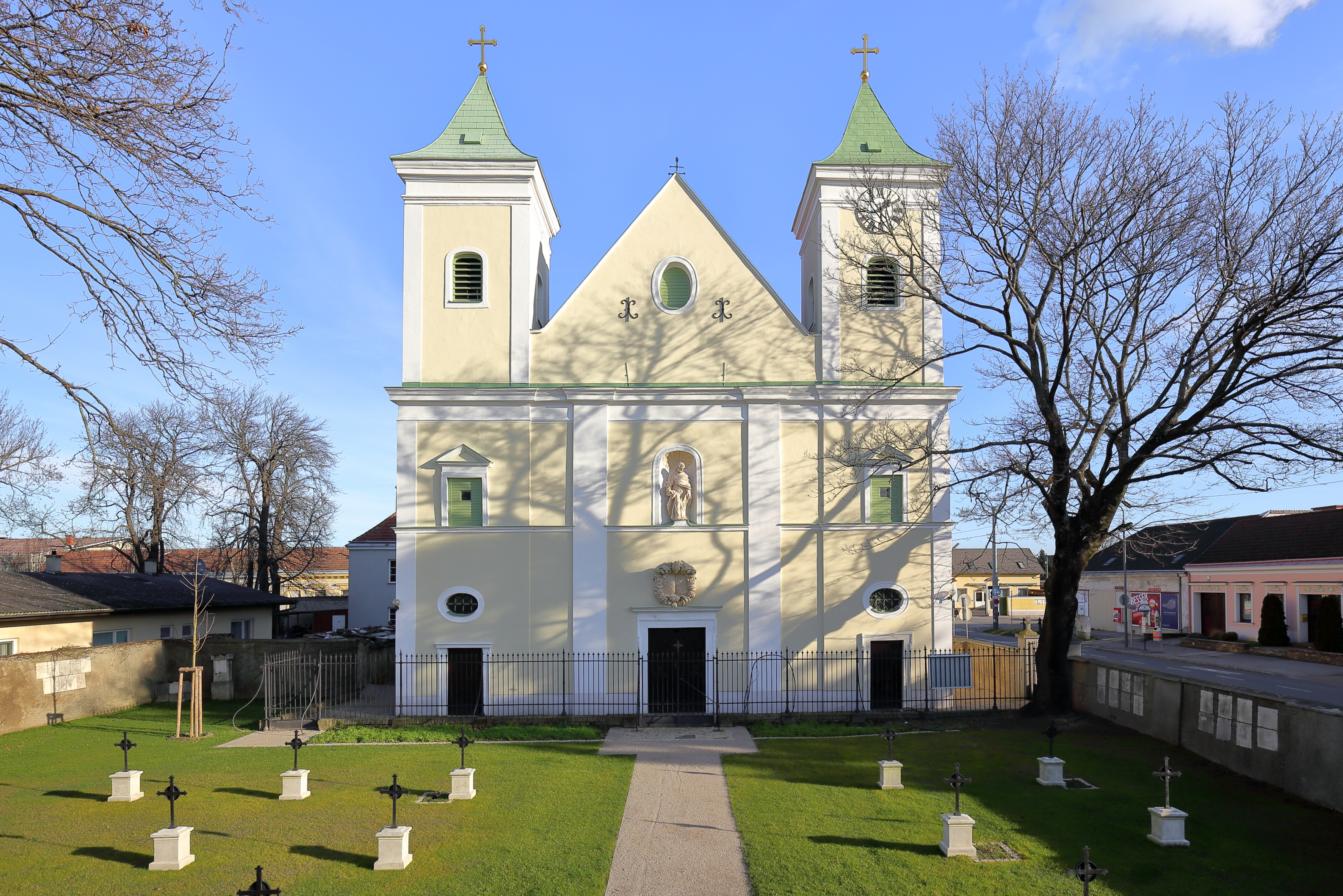 Westansicht der röm.-kath. Pfarrkirche Hl. Anna in Breitenlee im 22. Wiener Gemeindebezirk Donaustadt. Im Vordergrund der im Jahr 1807 angelegte Stiftsfriedhof der Schotten. Über dem Kircheneingang das Wappen von Sebastian Faber, Abt des Schottenstiftes (1683-1703).